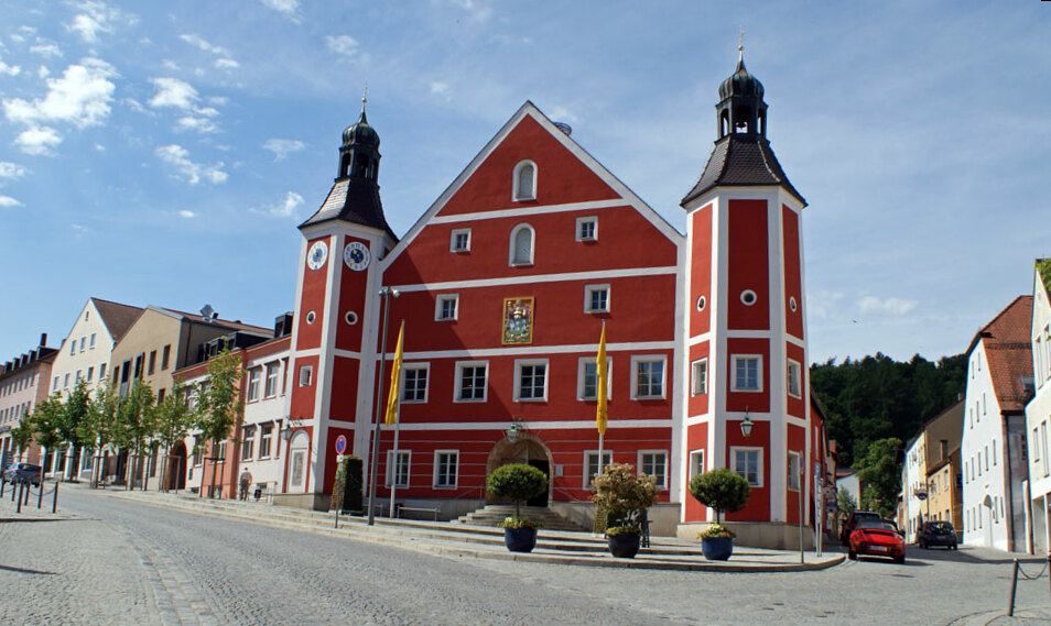 Rathaus der Stadt Burglengenfeld